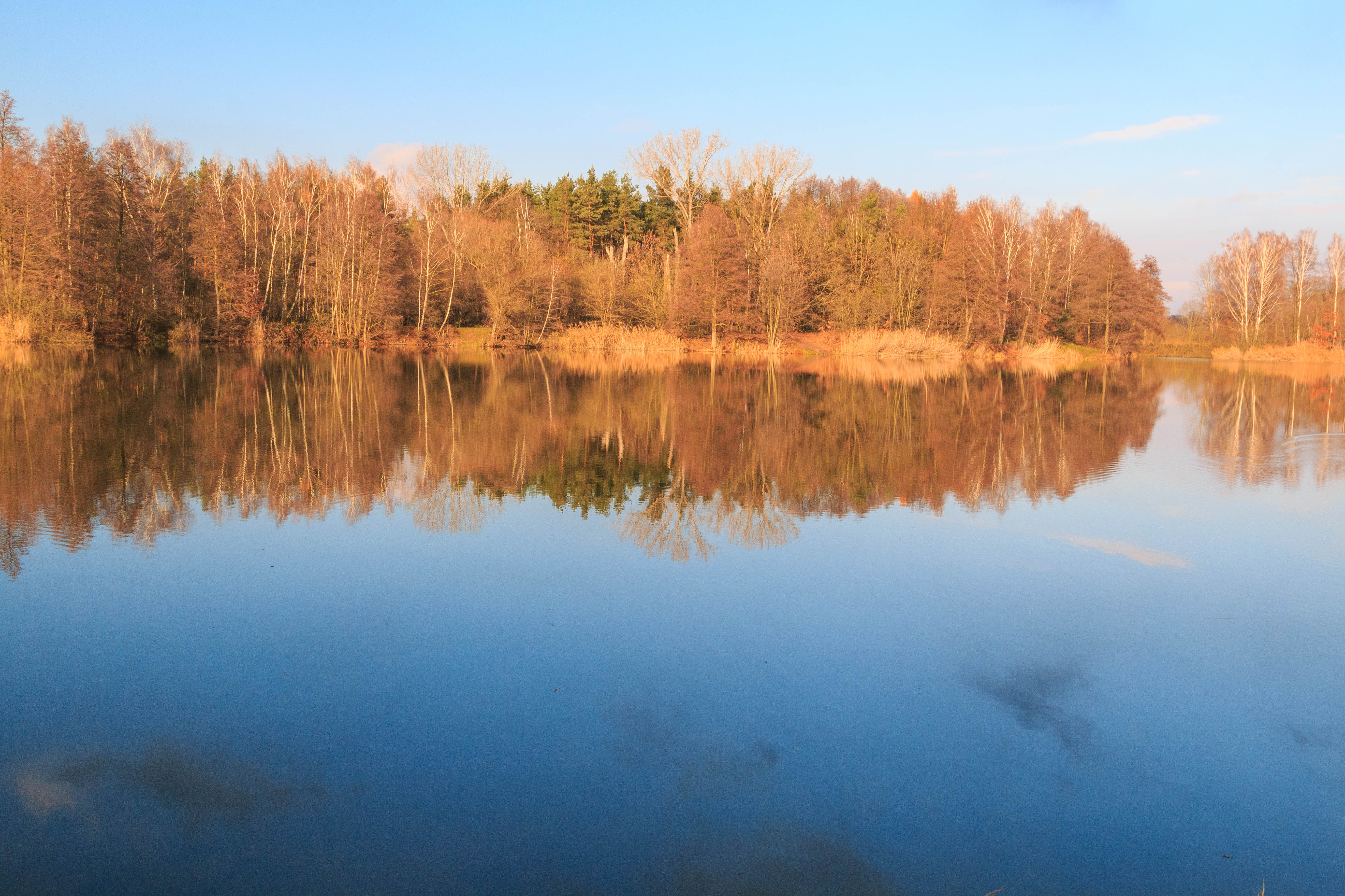 Písník Velká Černá Project: Vodstvo.